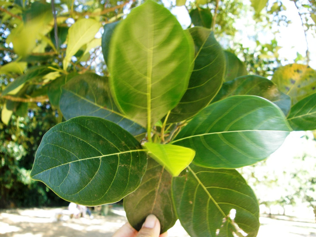 Artocarpus integer, Blatt